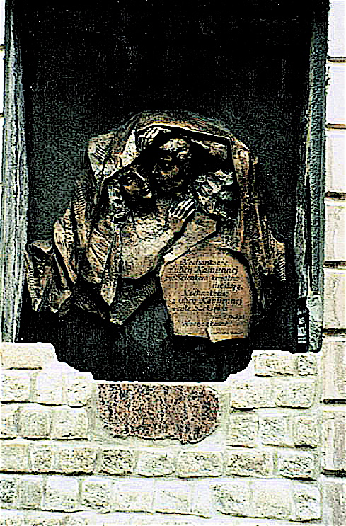 Plaskorzeźba-fontanna "Kochankowie z Ulicy Kamiennej", poświęcona Agnieszce Osieckiej, autorstwa Wojciecha Gryniewicza